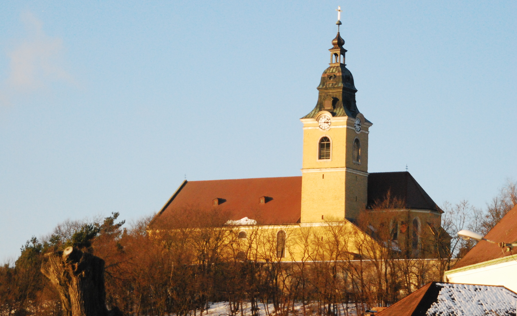 Die Pfarrkirche von Weitersfeld in Niederösterreich